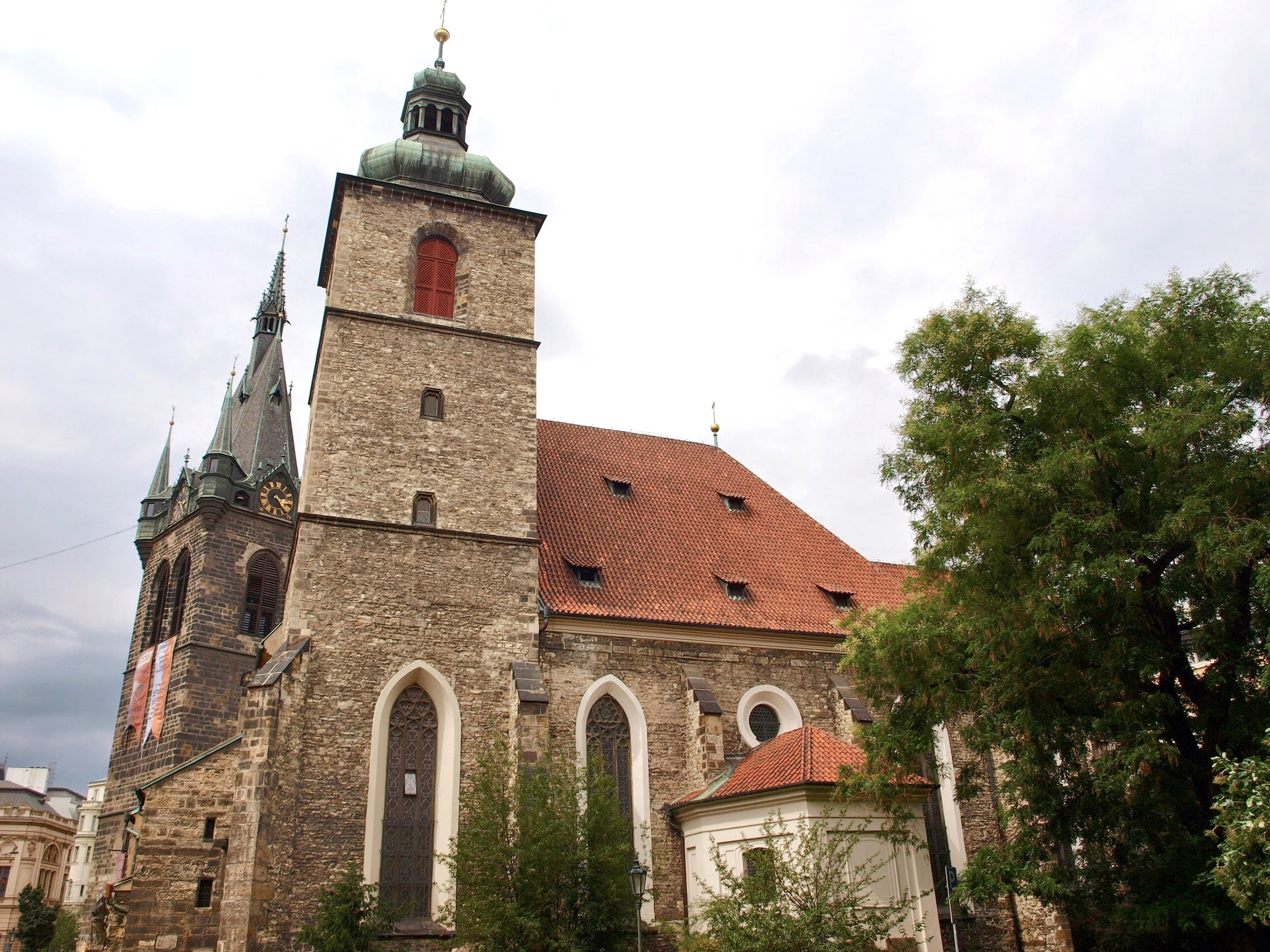 Praha, kostel sv. Jindřicha